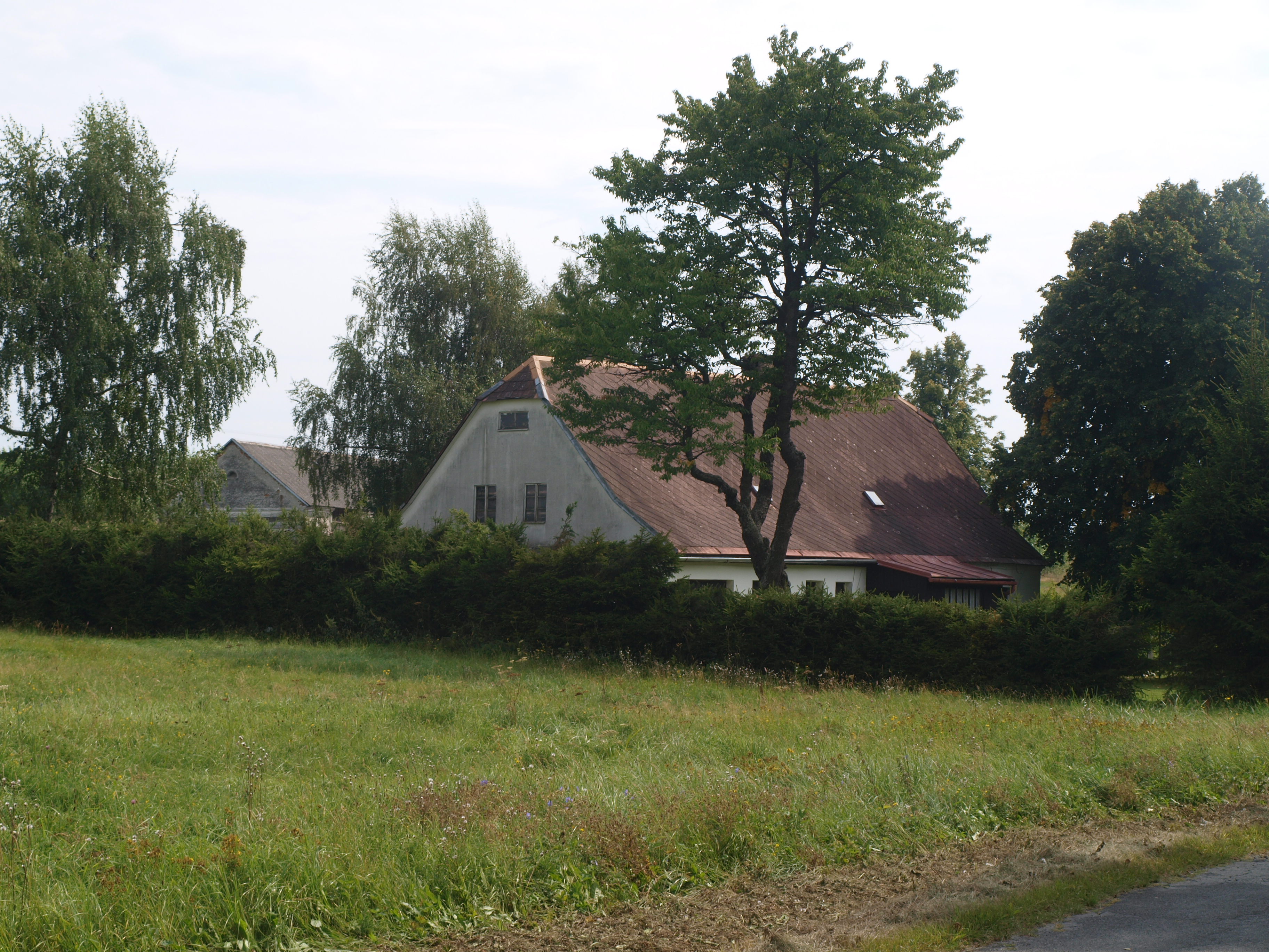 Usedlost ve Stříbrných Horách v okrese Bruntál